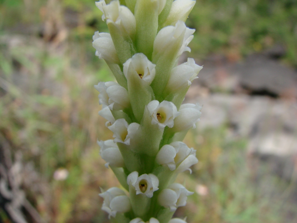 Prescottia plantaginifolia Lindl. ex Hook. (Sinônimo: Prescottia corcovadensis Rchb.f.; Prescottia rodeiensis Barb.Rodr.; Prescottia stricta Schltr.; Prescottia plantaginea Hook.) - ORCHIDACEAE - Parque Nacional da Chapada dos Veadeiros - Alto Paraíso de Goiás - Goiás - Brasil.